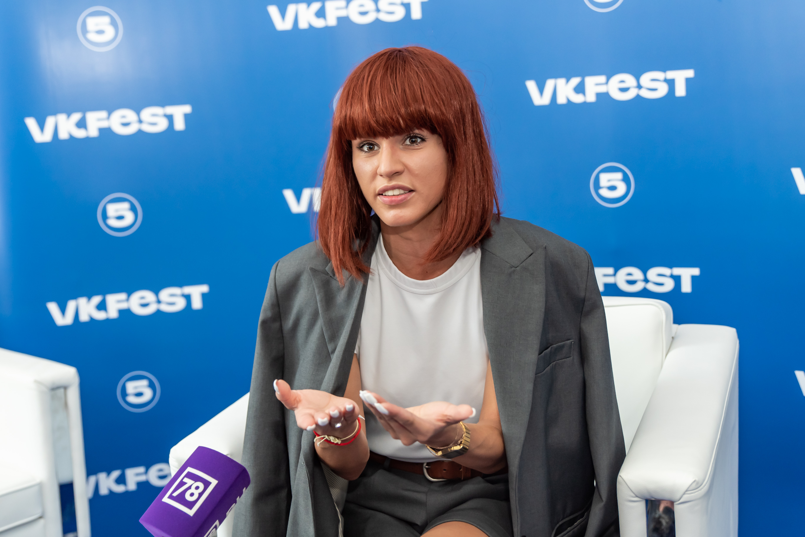 Zivert на VK Fest 5